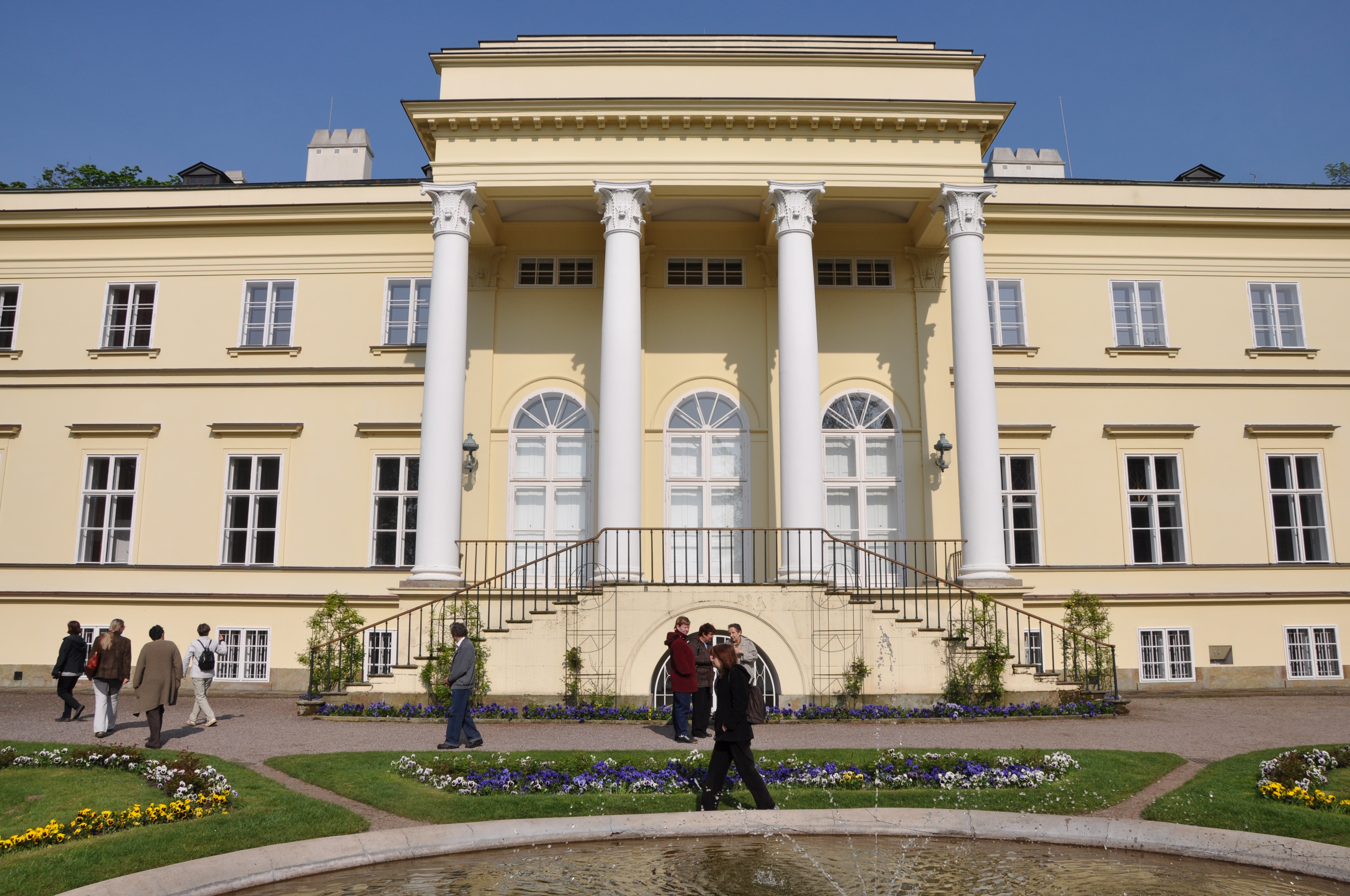 Česky: Průčelí zámku v Kostelci nad Orlicí